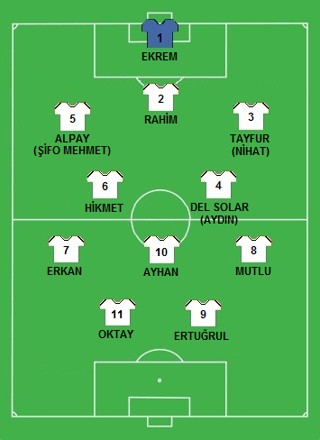 diğer_sürümler